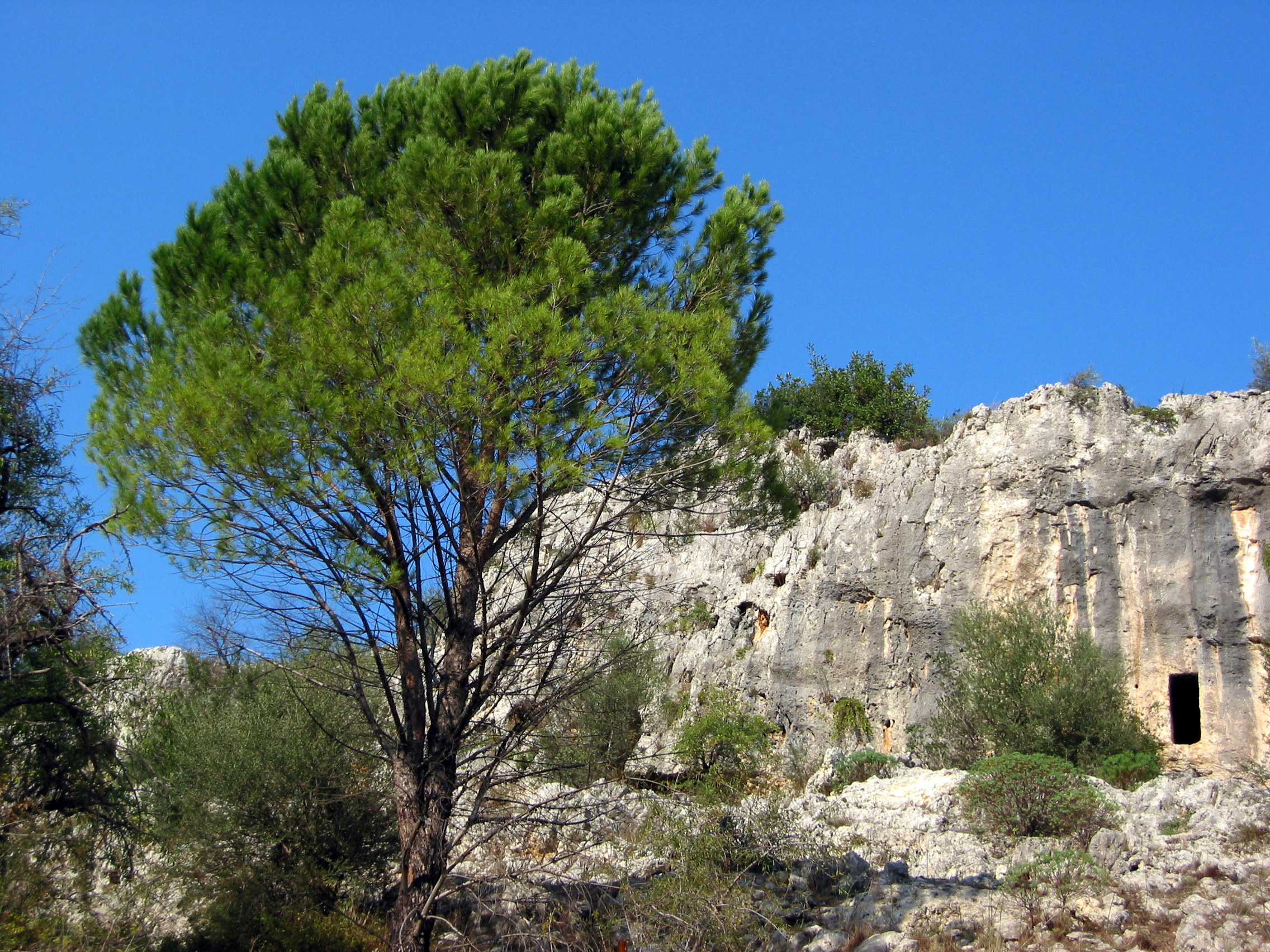 Tomba a Pantalica